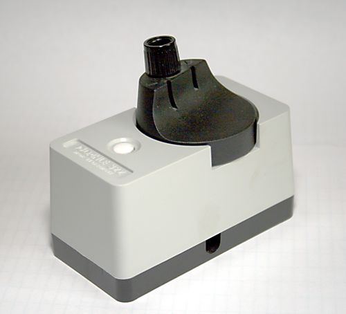 Minenspitzer Dahle 322. Er wurde u.a. als Requisite in der Fernsehserie „Raumpatrouille“ als Steuerungseinheit eingesetzt.